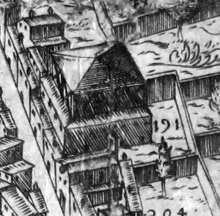 Pianta del buonsignori, dettaglio 191 tiratoio della pergola (teatro alla pergola)